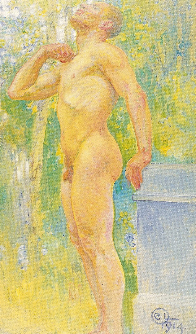 sketch